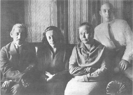 Башҡортса: Мәжит Ғафури, Мәстүрә Фәйзуллина, Зөһрә Ғафури, Ғәзиз Әлмөхәмәтов. Өфө, 1933